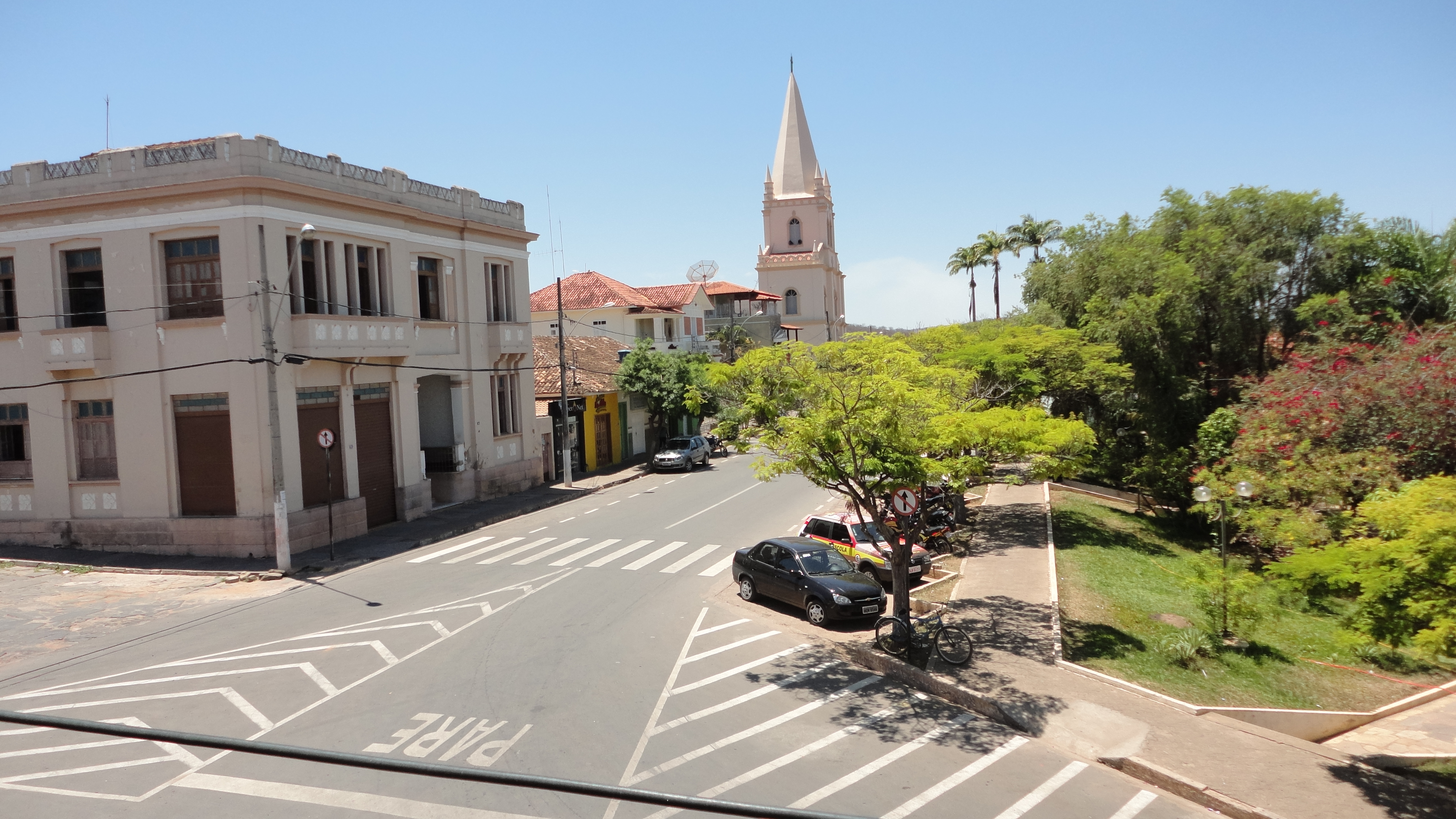 Praça em Salinas